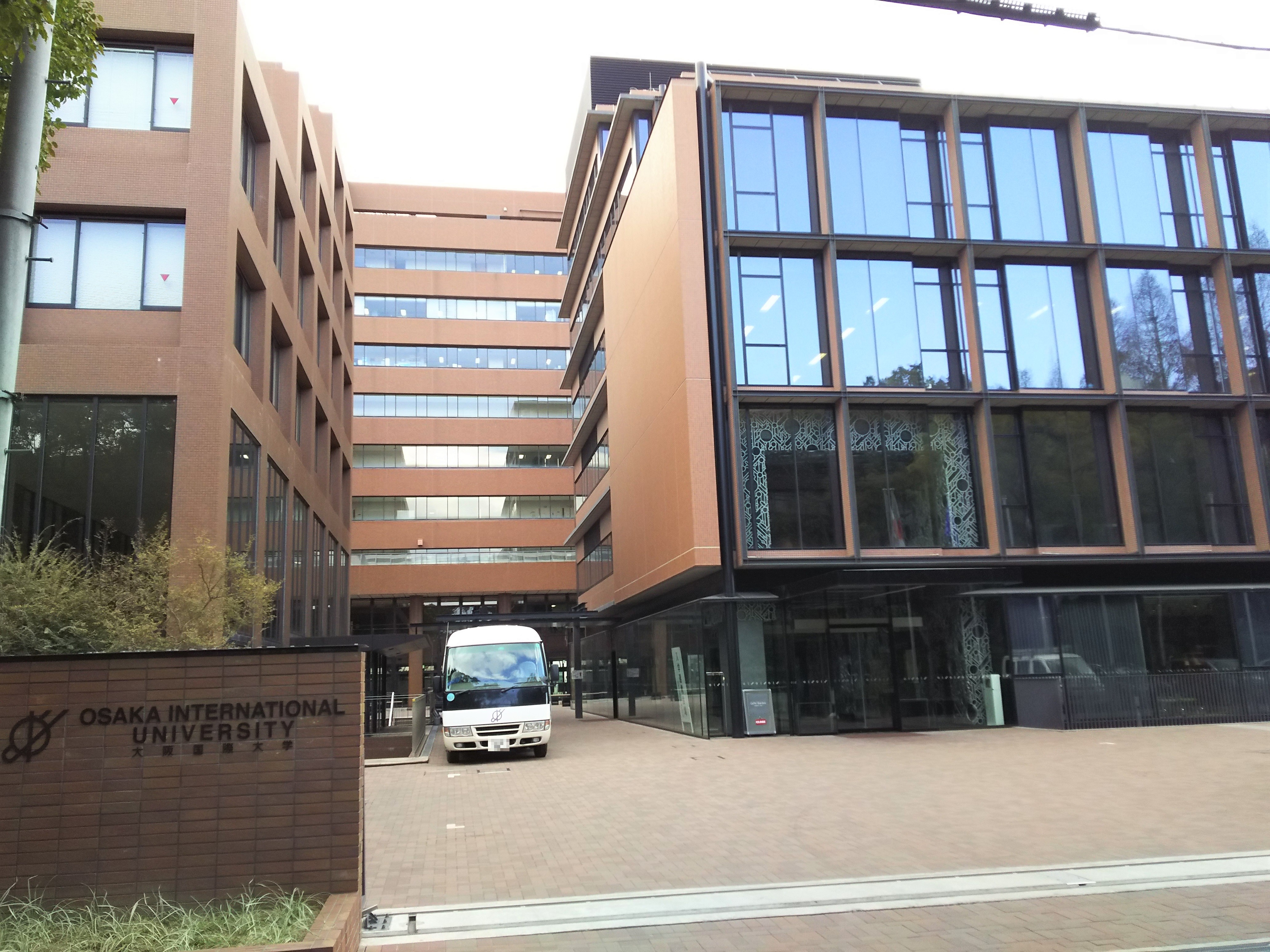 大阪国際大学（大阪府守口市）